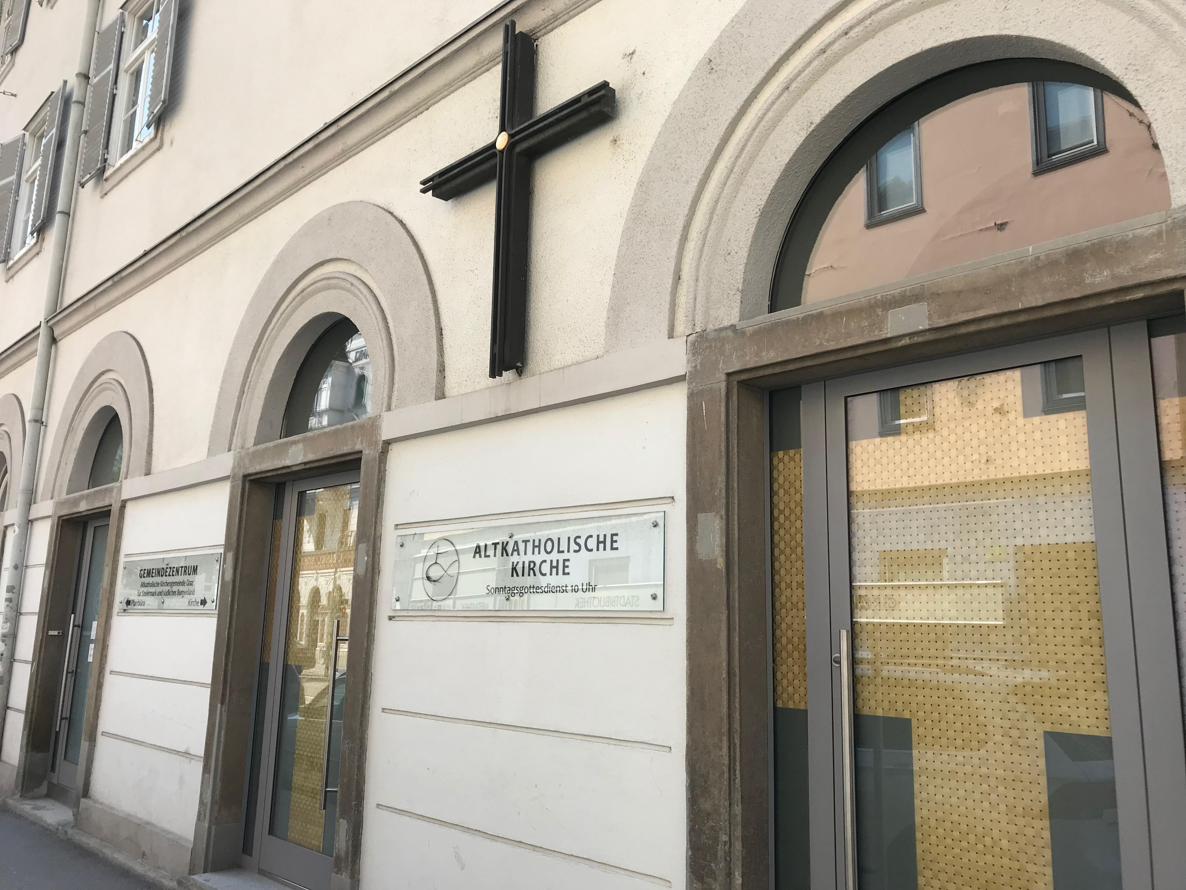 Eingangsportal